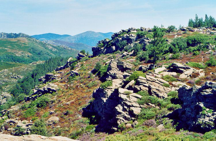 Description: Crêtes et gorges dans le massif du Caroux, France, Hérault Précisément ici: Les Gorges de Madale, vues depuis la Crête de Coudière, en lisière de la Forêt des Écrivains Combattants. Source: Hugo Soria Licence: GFDL Hugo Soria